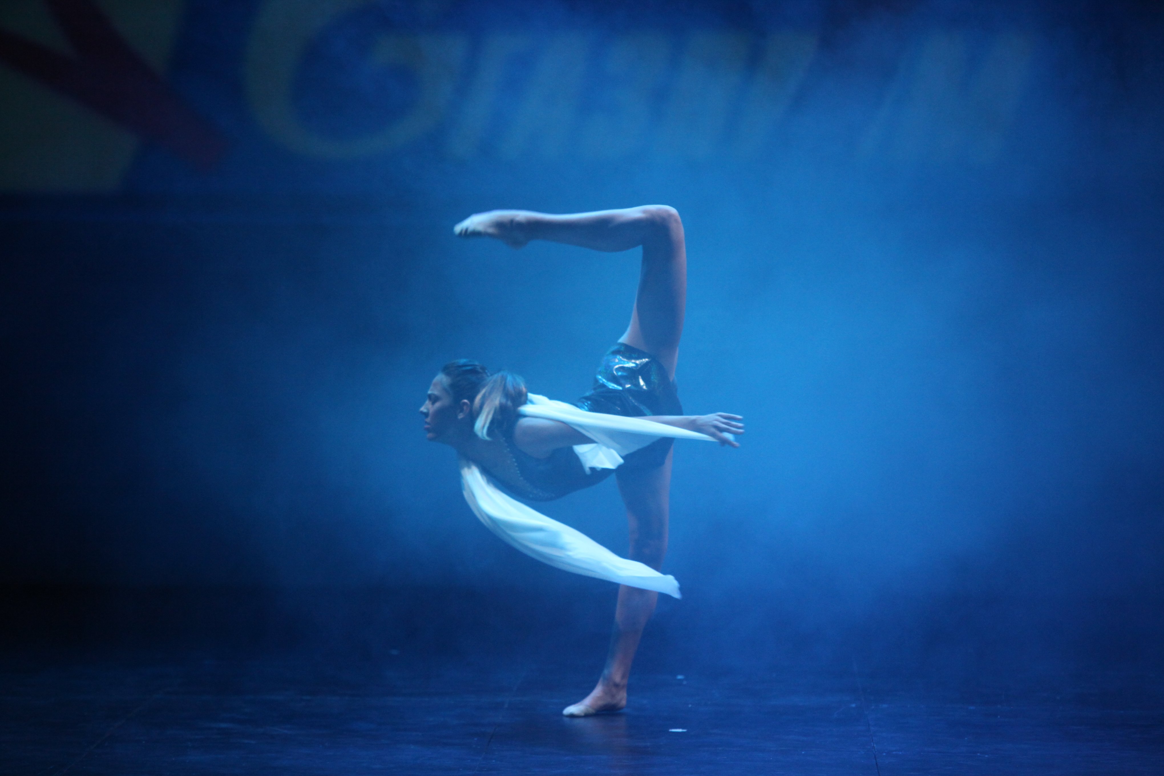 Actuación de la gimnasta rítmica Marina Fernández en la 61 Festa de l'esport en Sabadell el 24 de abril de 2014.